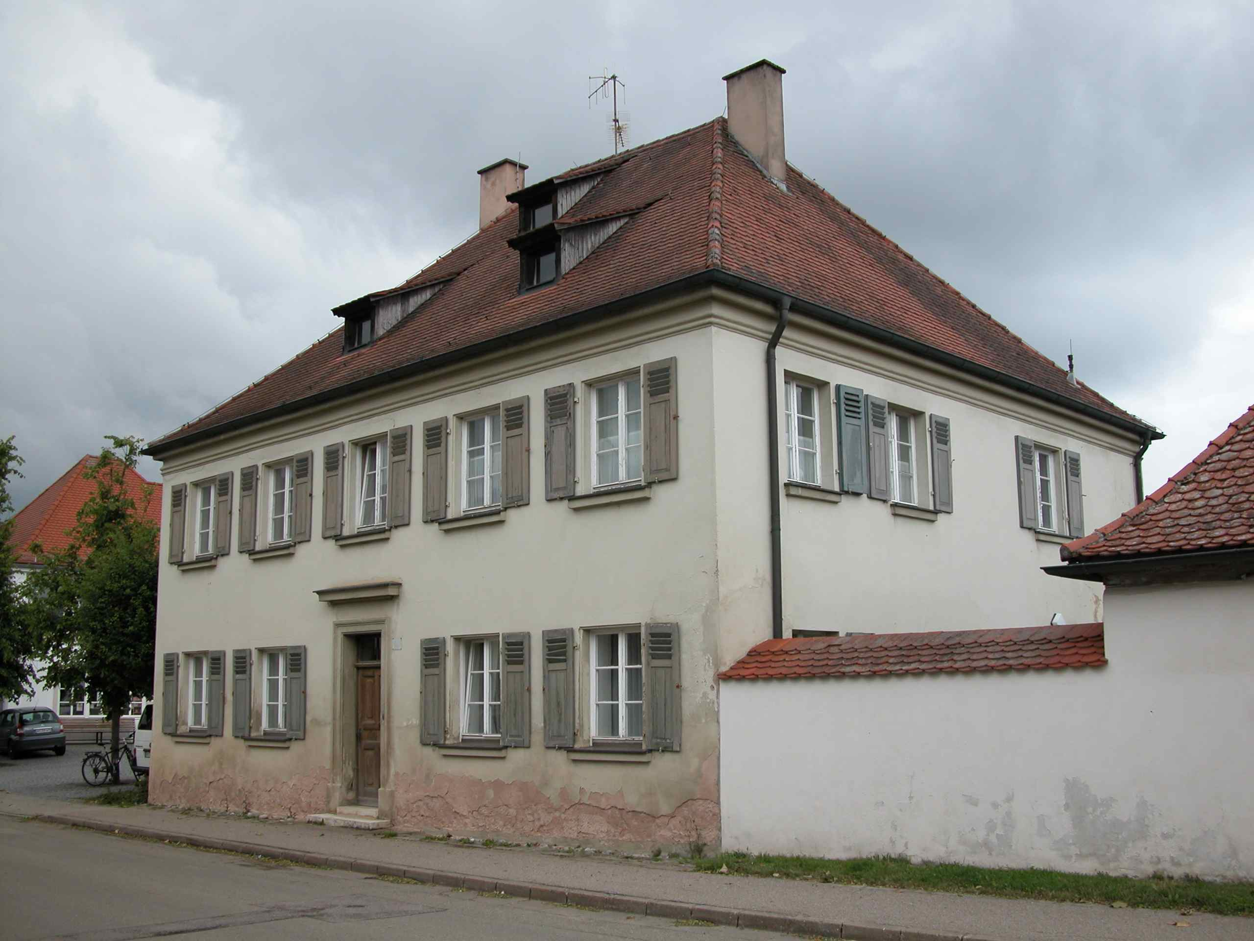 Cronheim 180 Pfarrhaus